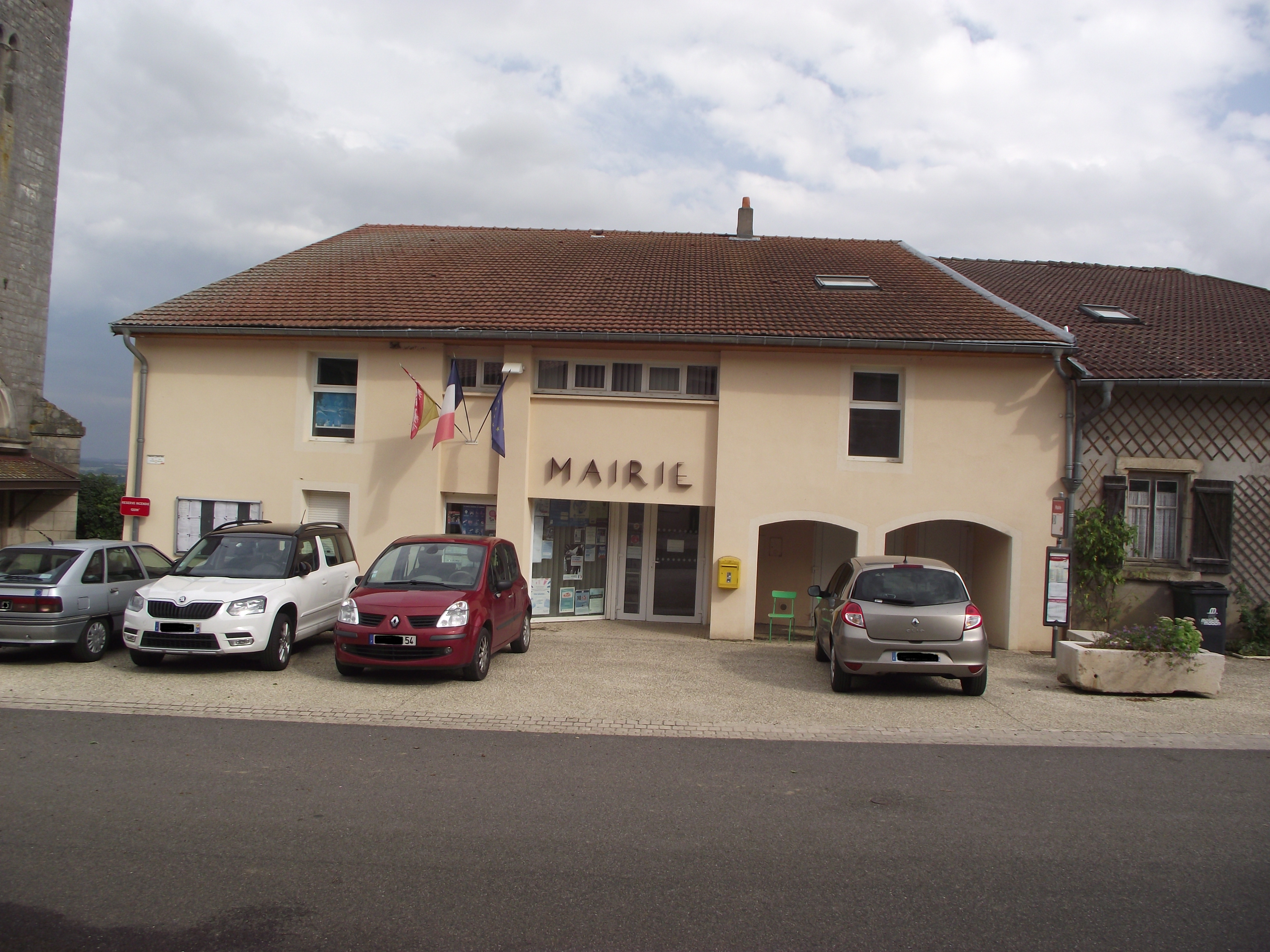 Mairie de Thelod